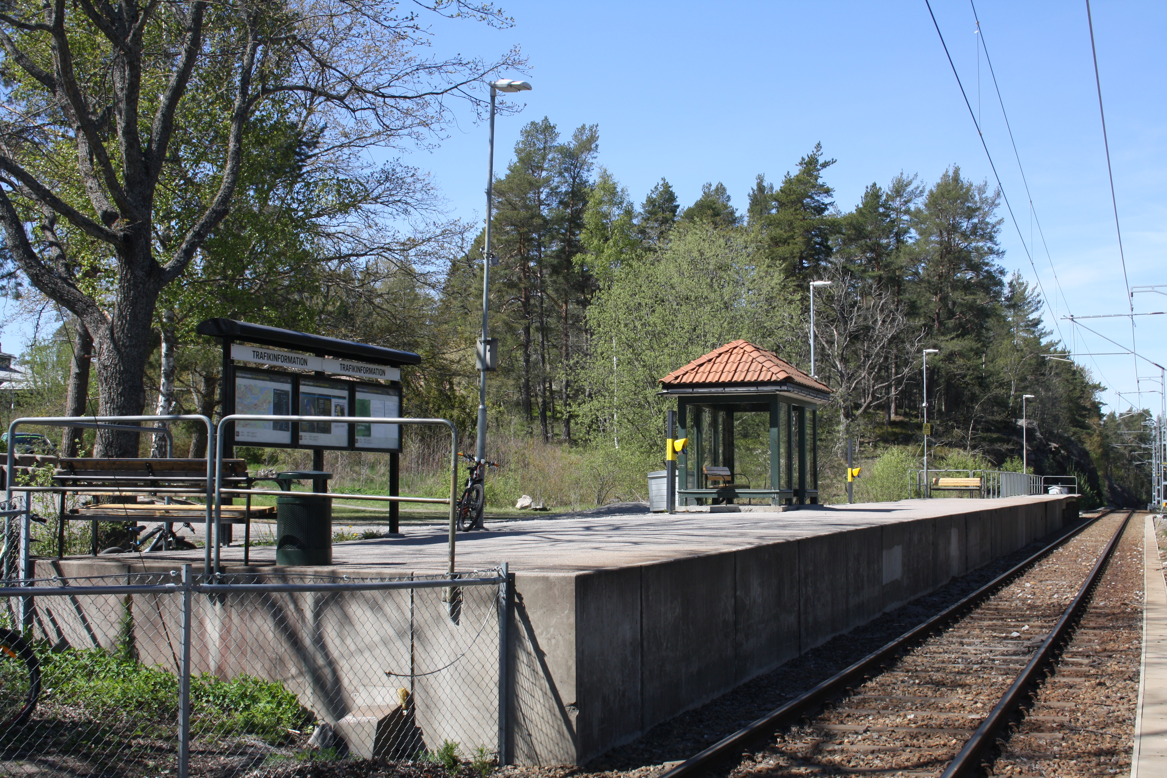 Tattby station